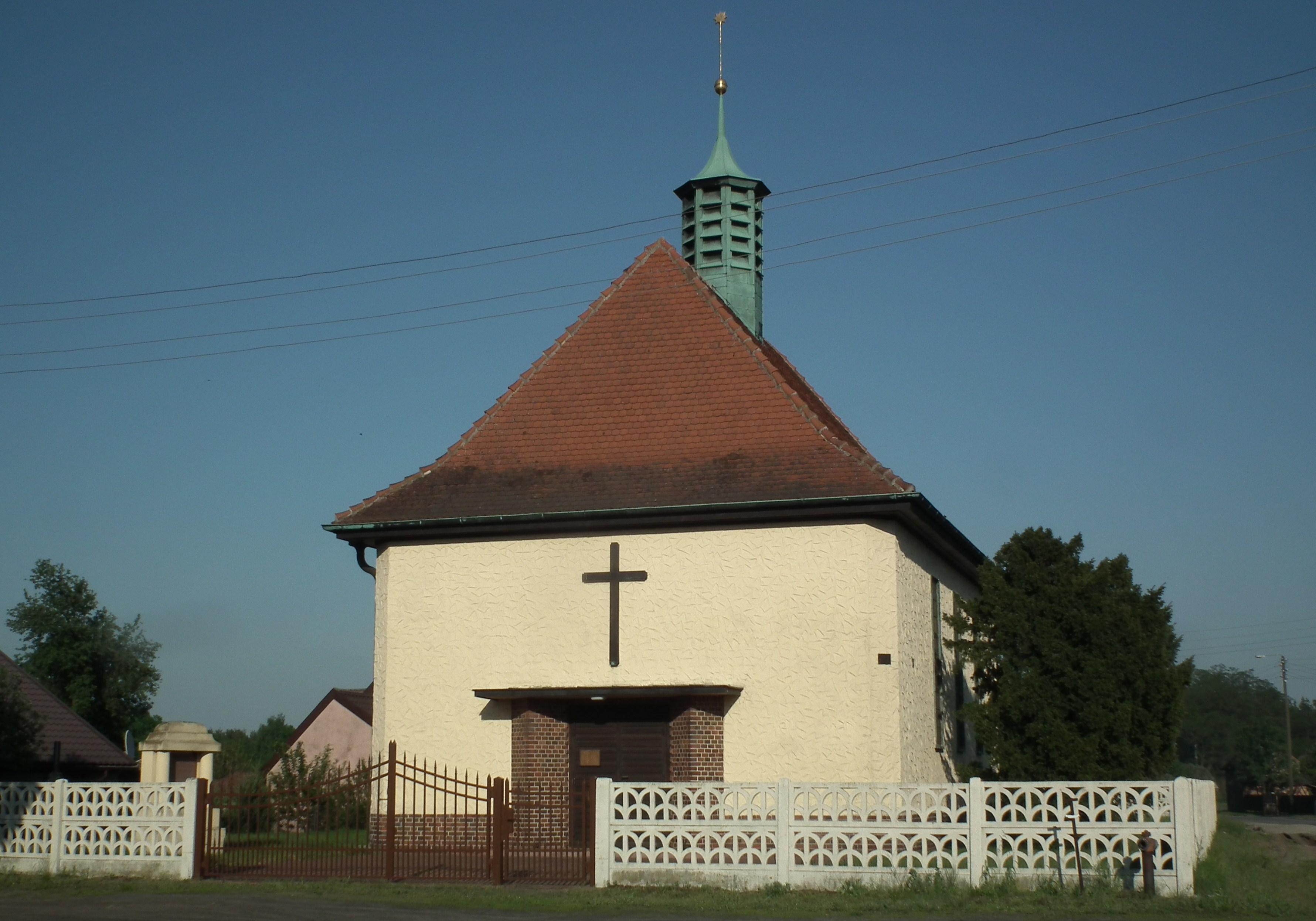 Kościół ewangelicki w Starej Hucie.